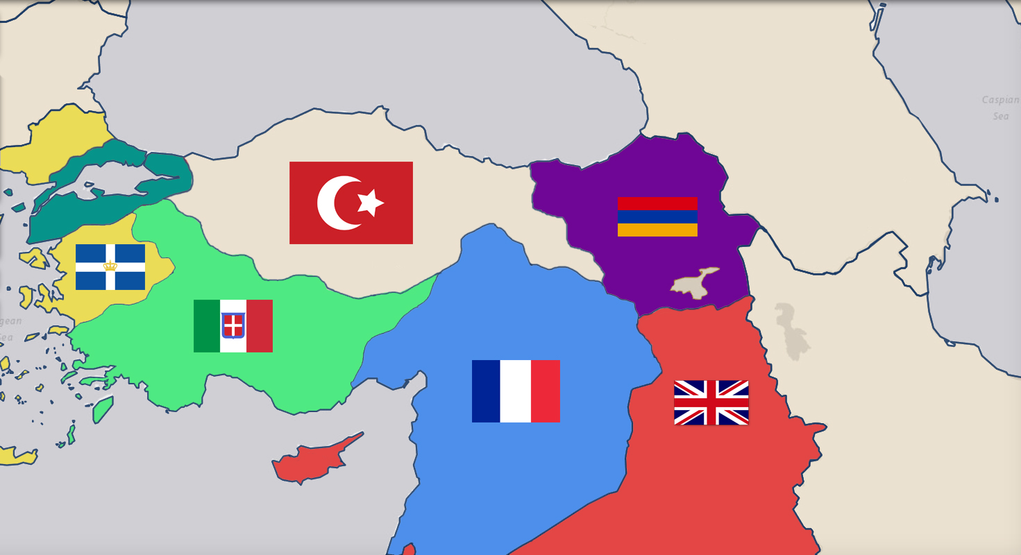 Sevr Antlaşması'nın haritası.